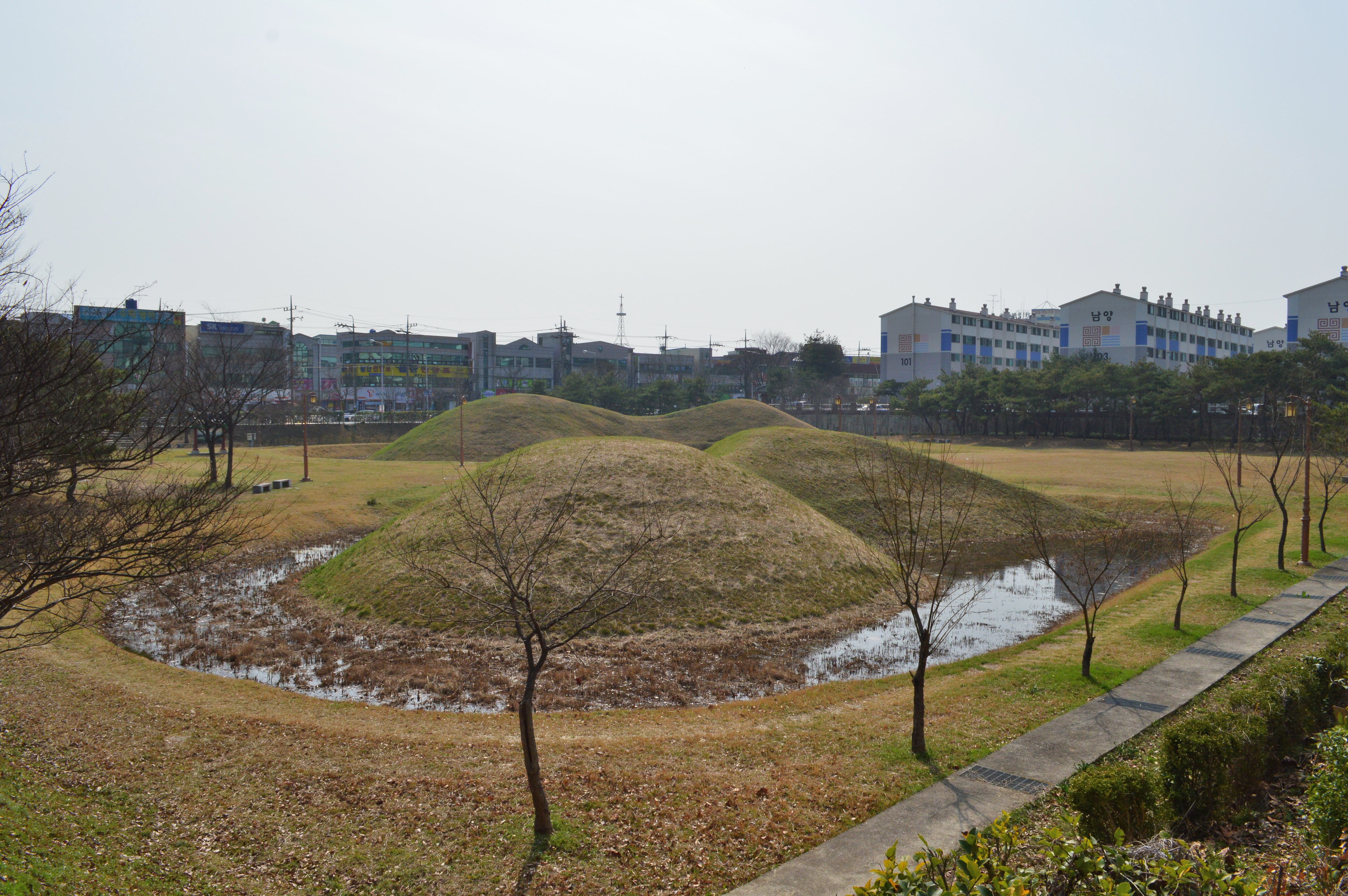 光州月桂洞古墳群 全景